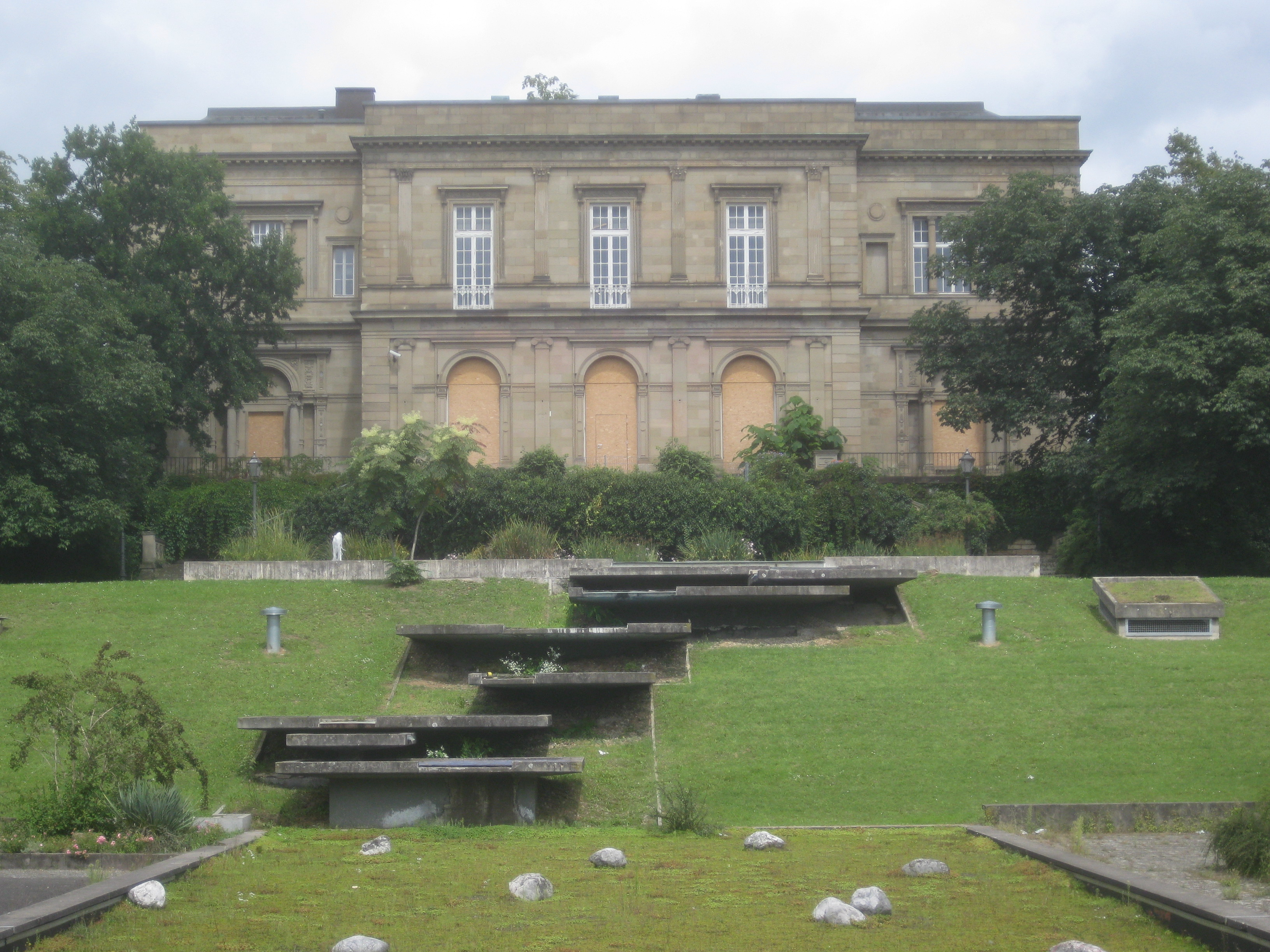 Stuttgart, Villa Berg, Ansicht von Süden.